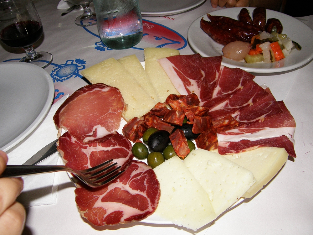 Antipasto (Vorspeise) in den Abruzzen